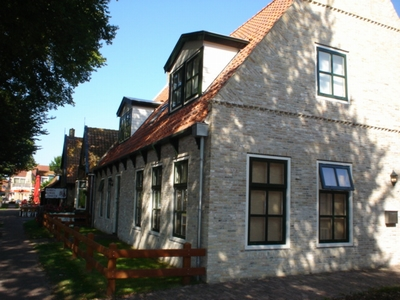 Nedersaksies: Amelaand_huze.jpg